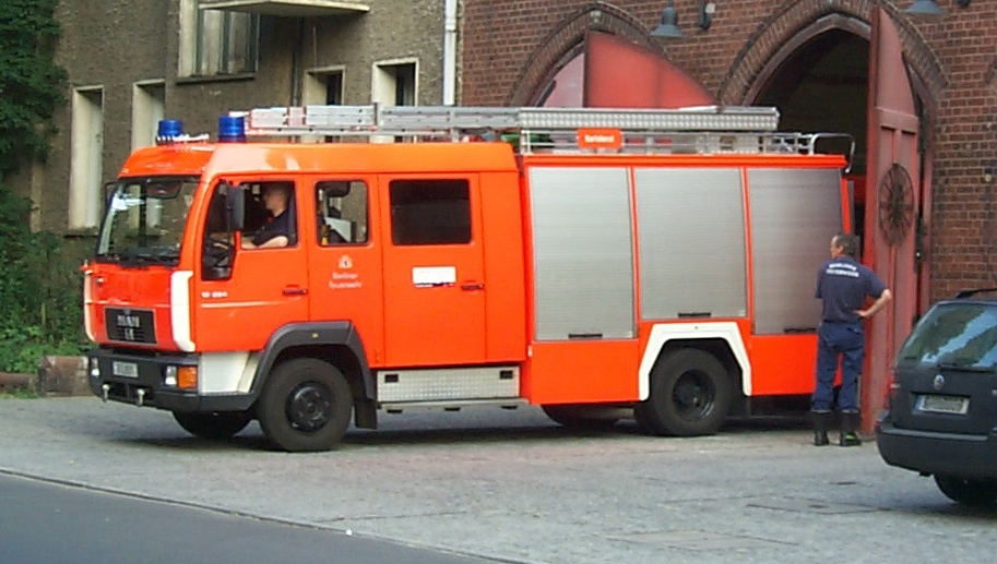 Löschhilfeleistungsfahrzeug 16-12 der Berliner Feuerwehr